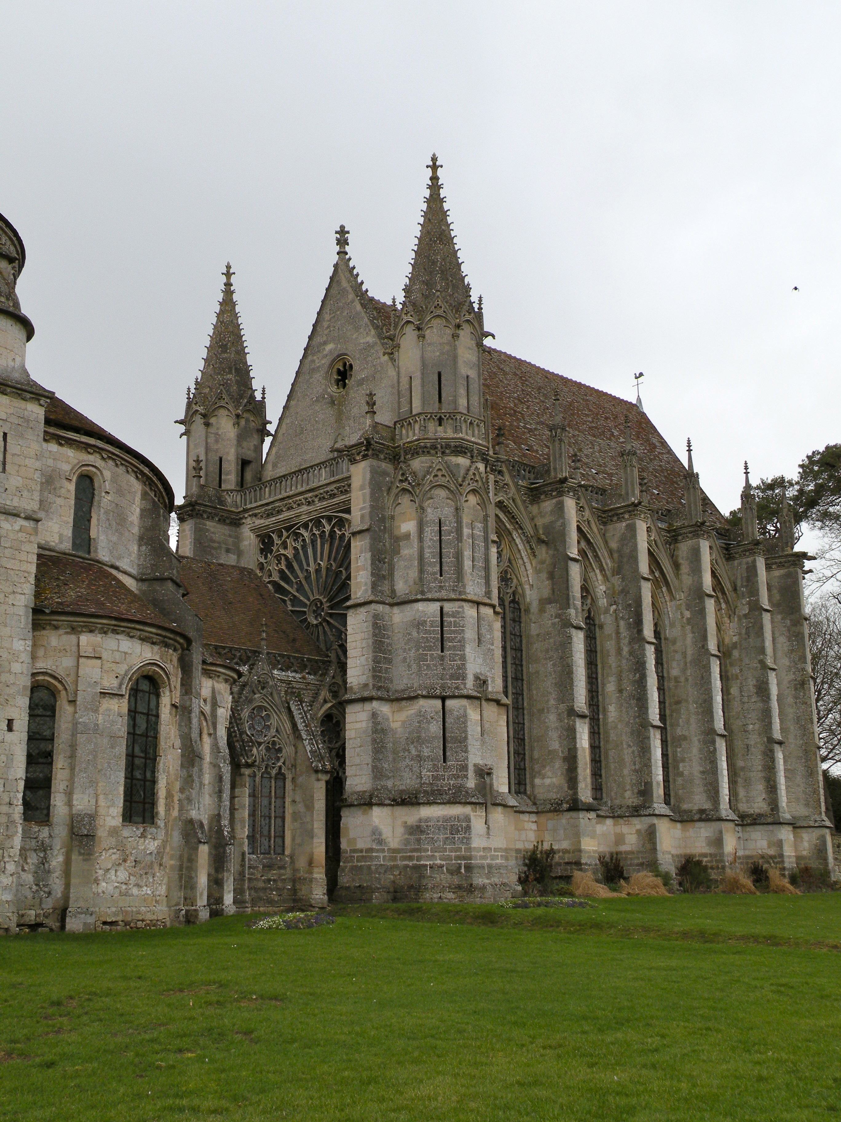 extérieur de l'Abbaye Saint-Germer-de-Fly